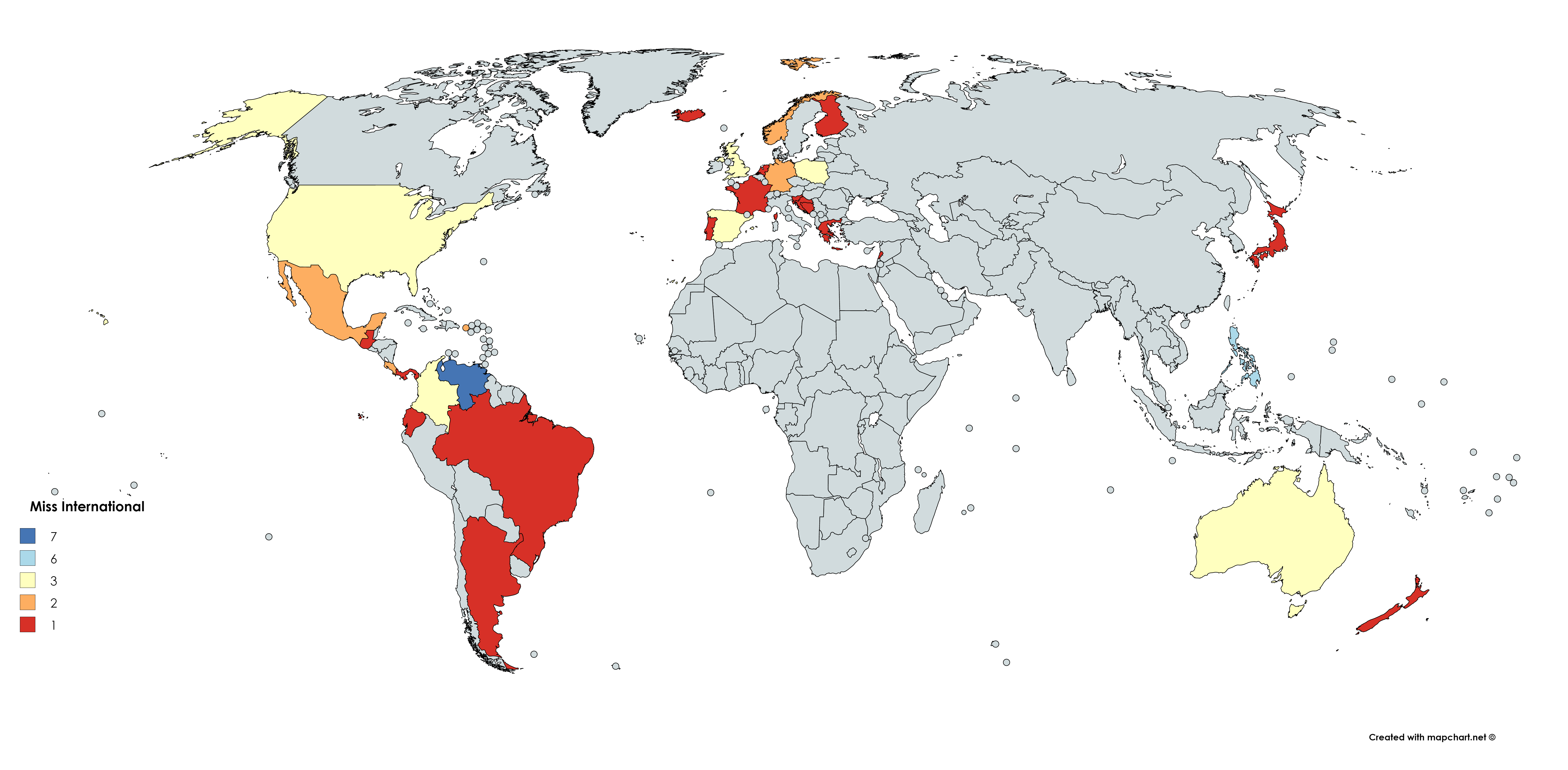 按國際小姐得主所來自國家地理分佈圖（截至2016年）